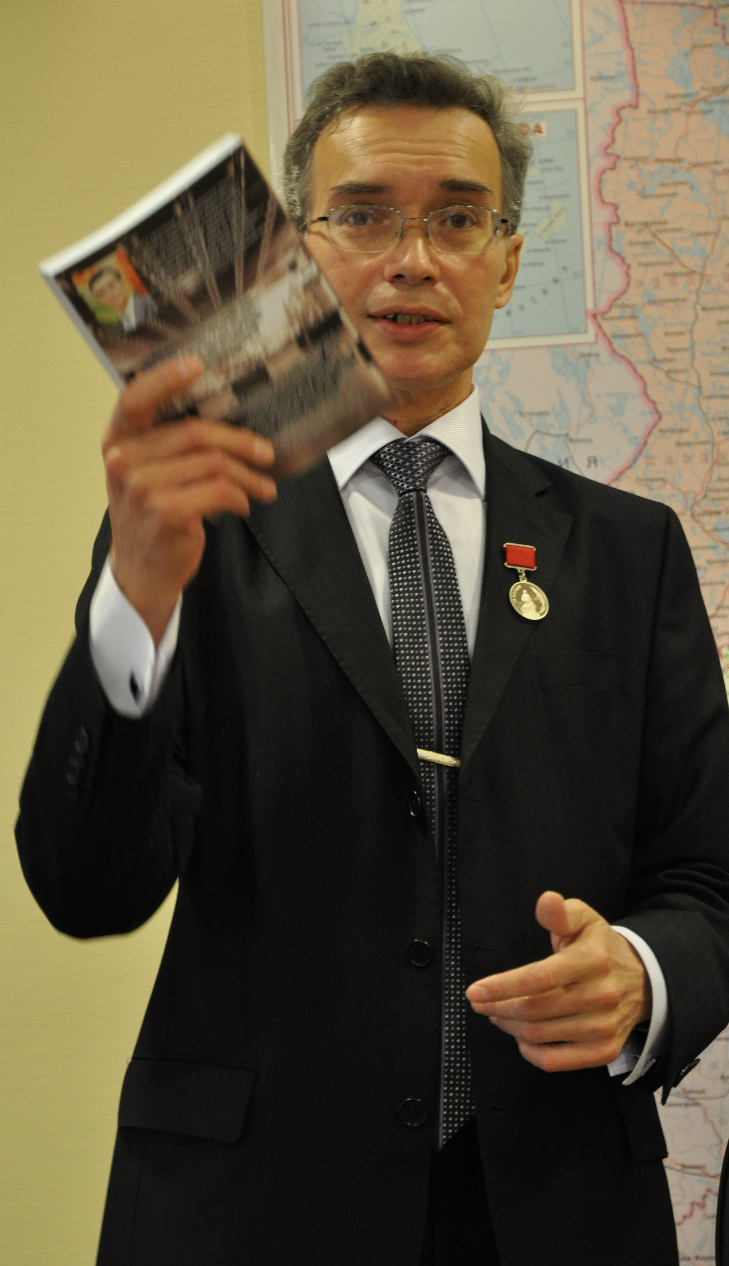 Виктор Николаевич Кокосов. 2013 год